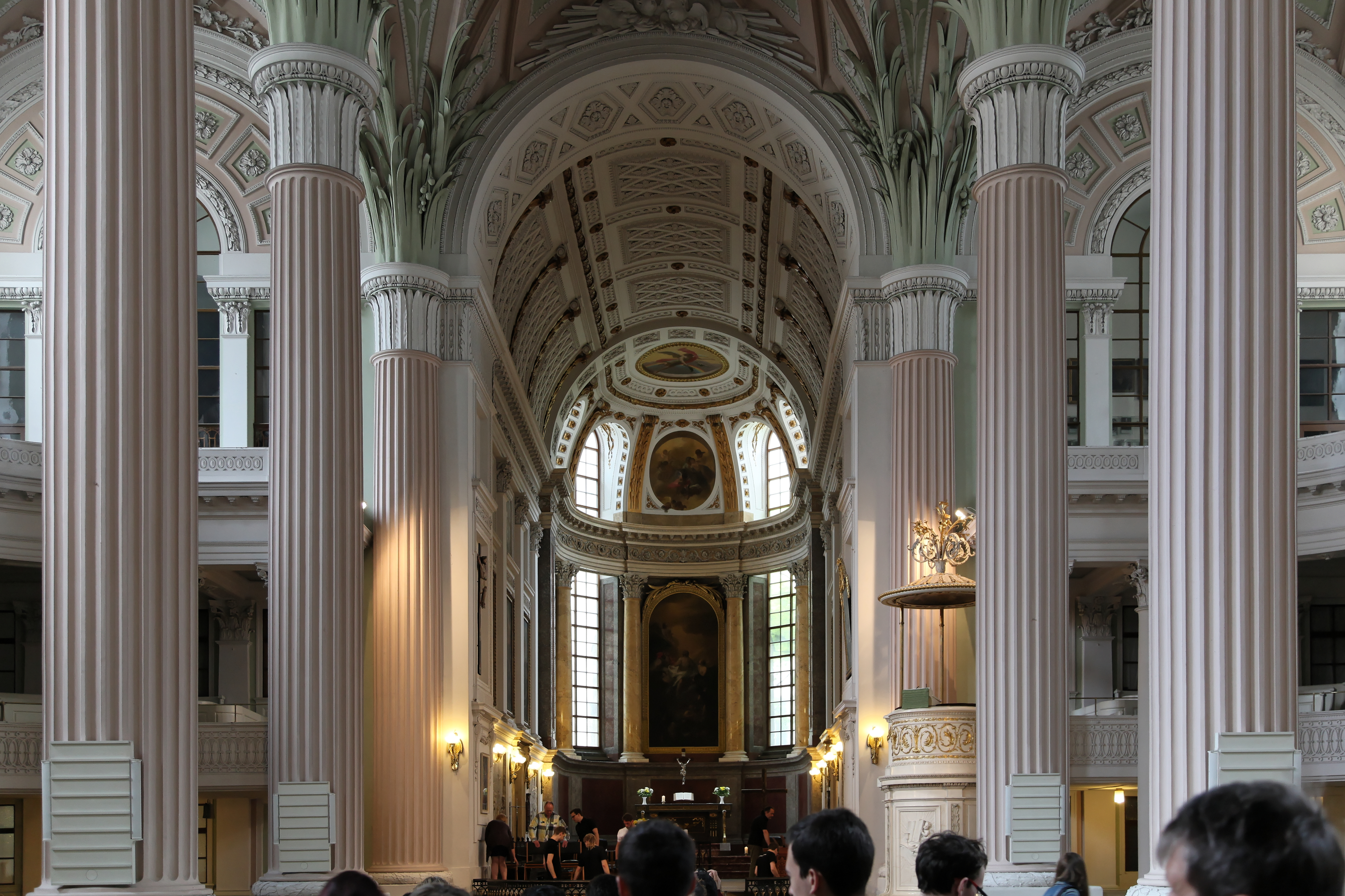 Nikolaikirche, Nikolaikirchhof in Leipzig